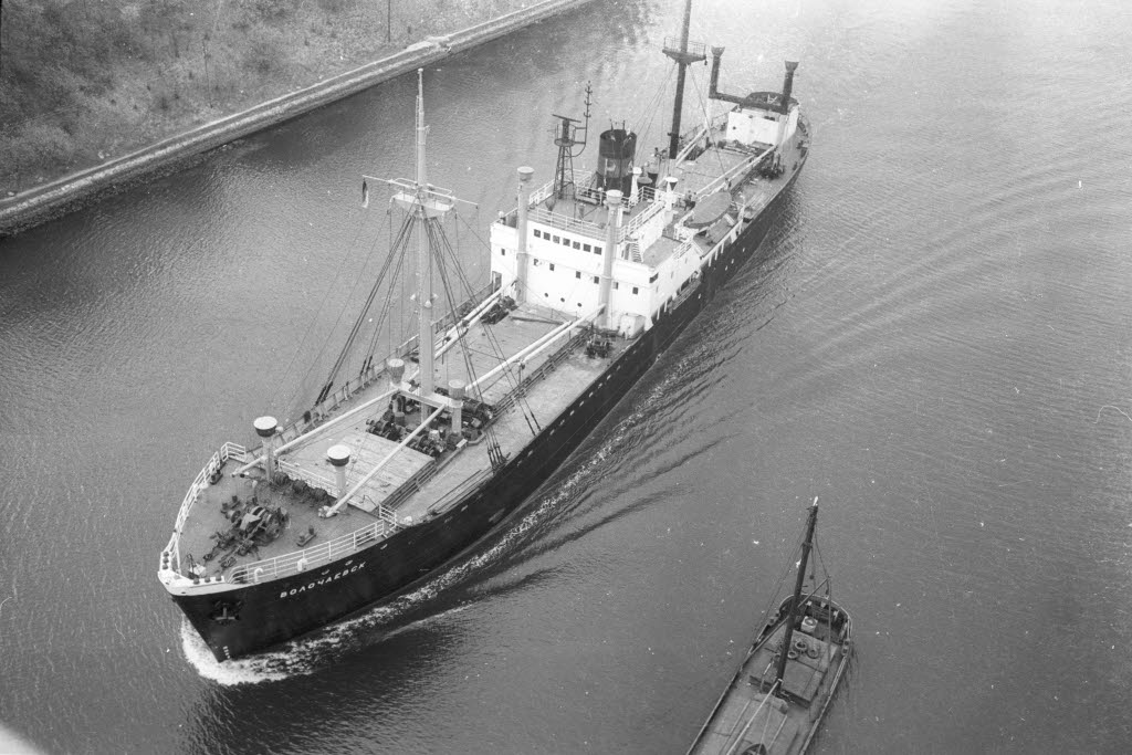 bei der Levensauer Hochbrücke im Nord-Ostsee-Kanal.